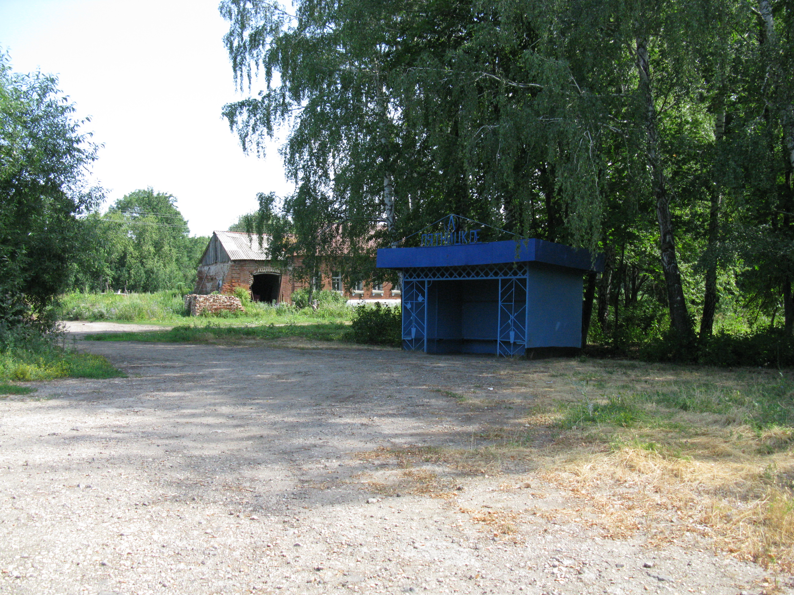 Село Пятницкое Краснинского района Липецкой области